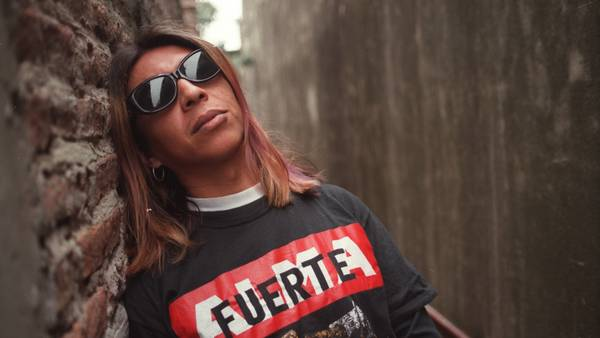 Manuel Ricardo Espinosa